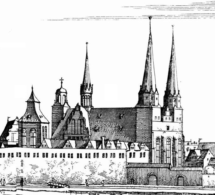 Berliner Dom von Nordwesten, 1652